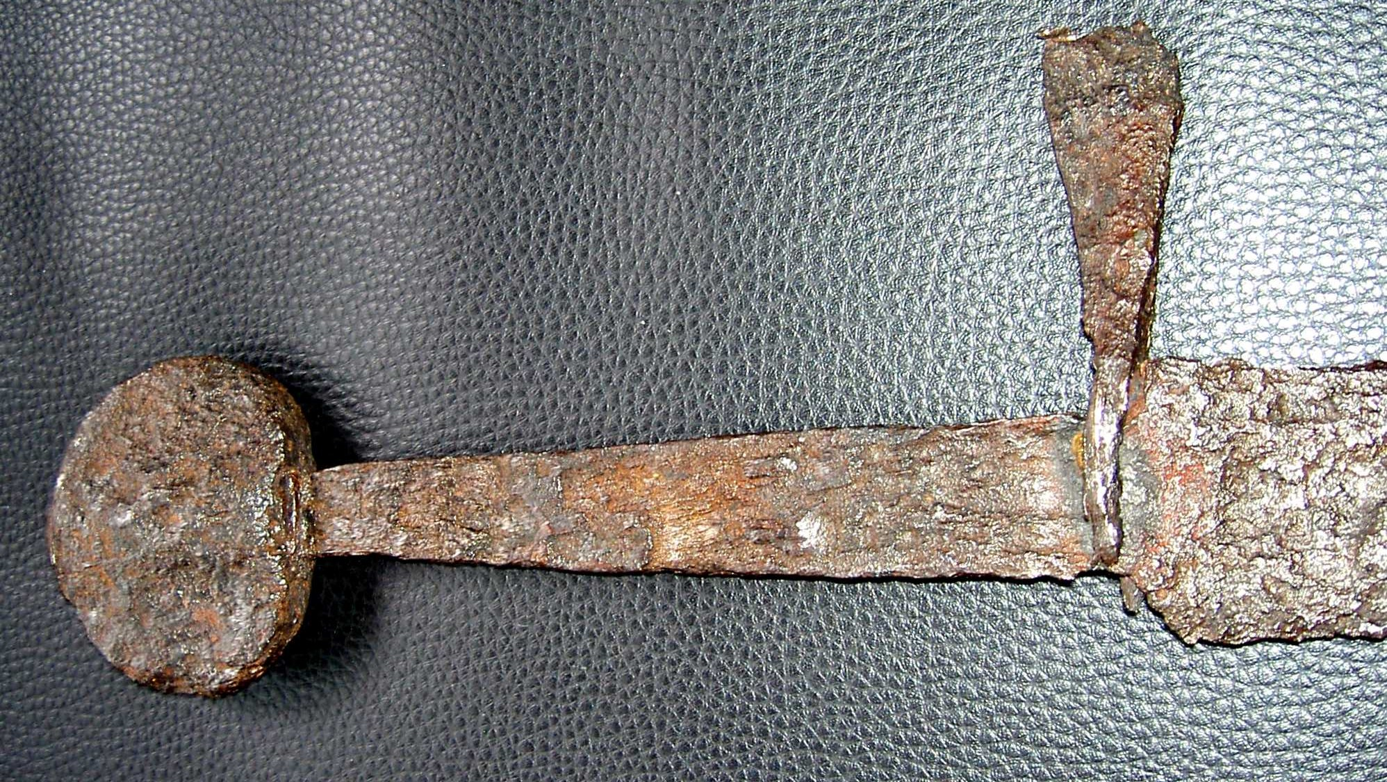 Ein hochmittelalterliches Borschwert.